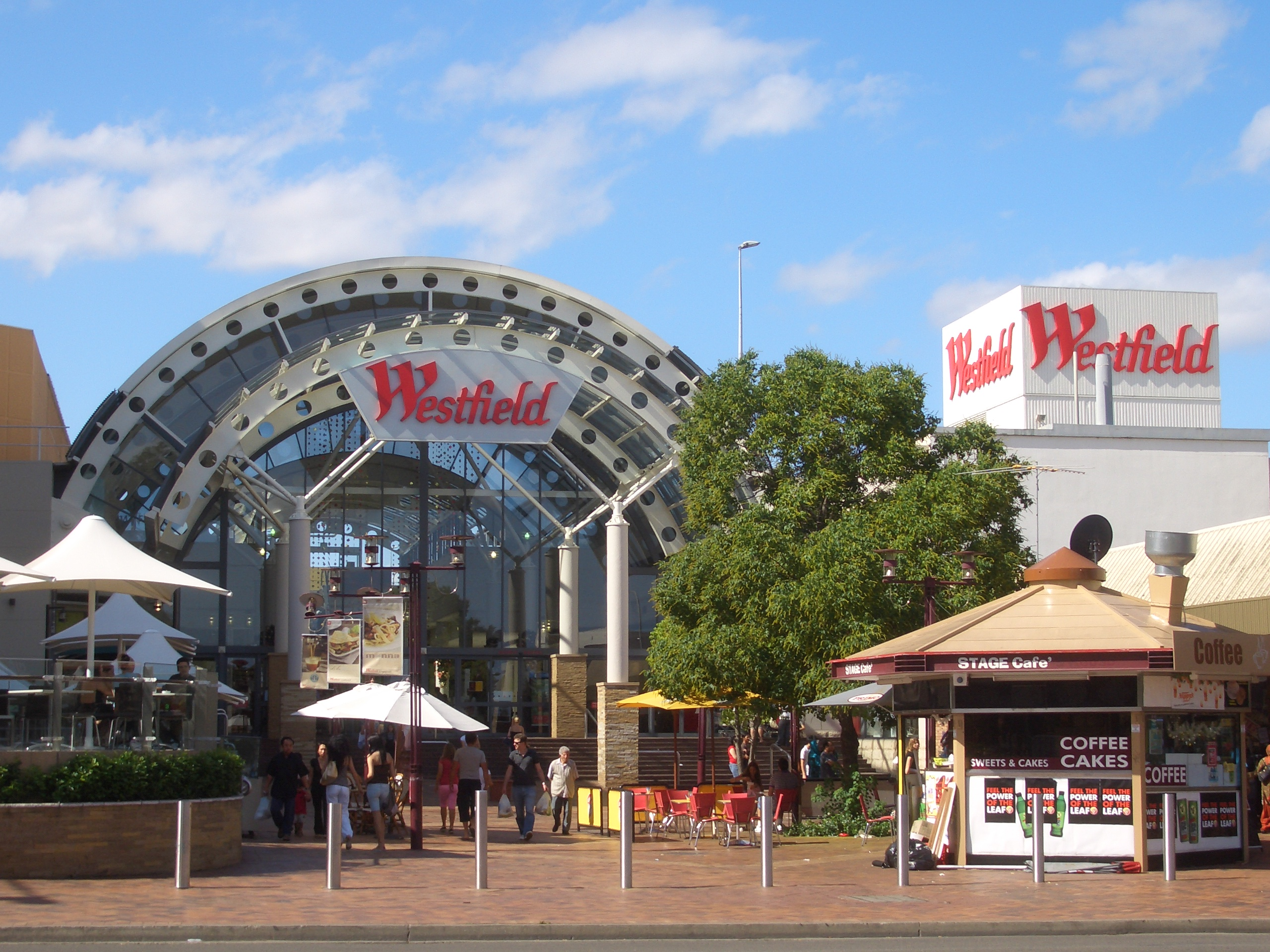 Westfield Liverpool, Sydney